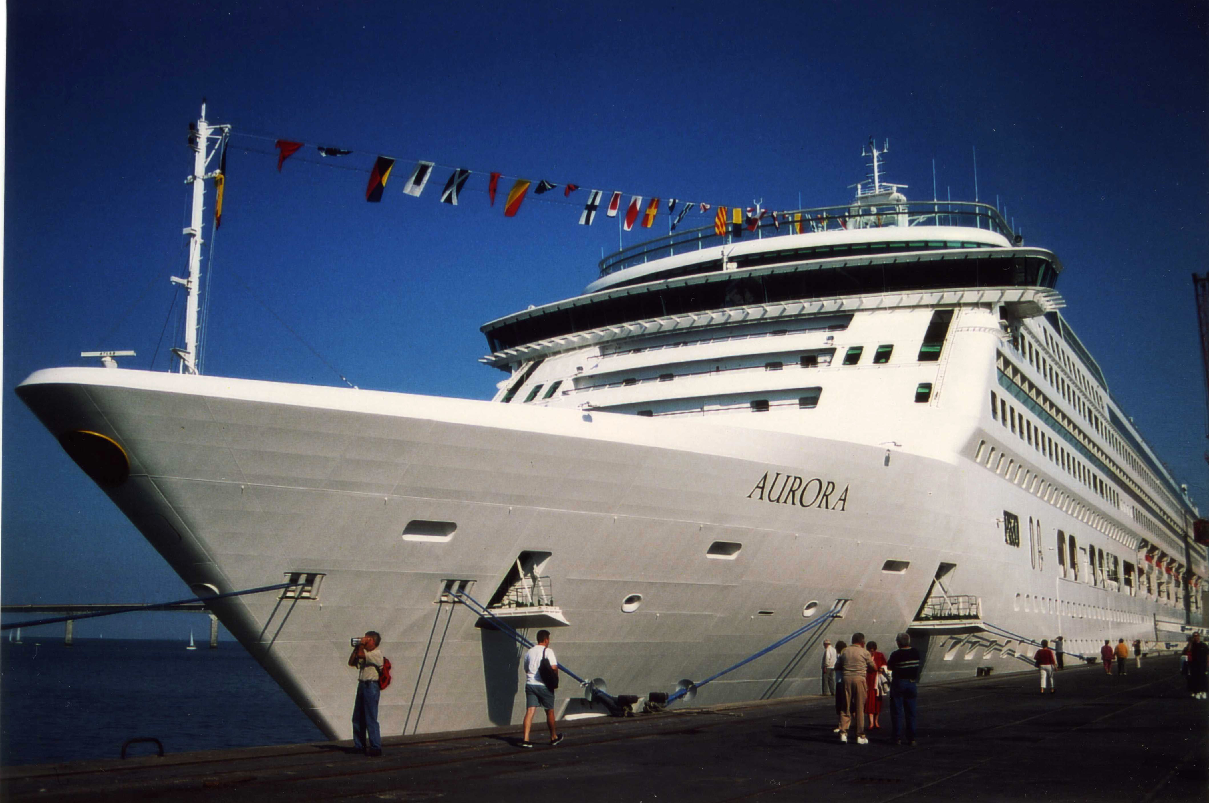 Le paquebot de croisière M/S Aurora en escale à La Rochelle (au môle d'escale du port de commerce de La Rochelle-Pallice), Charente Maritime, France. Le M/S Aurora a été mis en service en 2000, mesure 290 mètres de long et peut embarquer jusqu'à 1950 passagers. Date de la photographie: août 2000